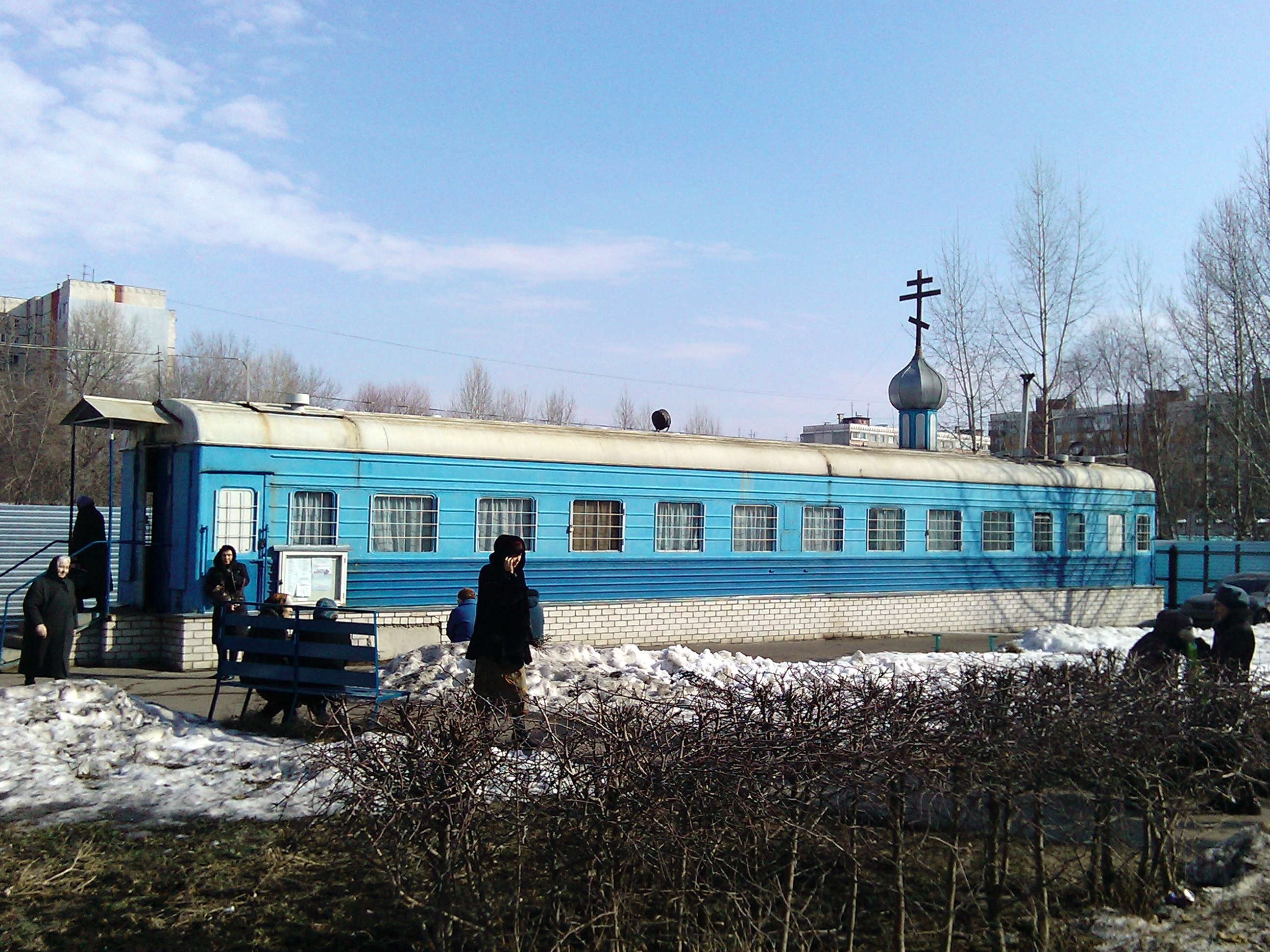 Церковь иконы Пресвятой Богородицы «Умиление» (Нижний Новгород)